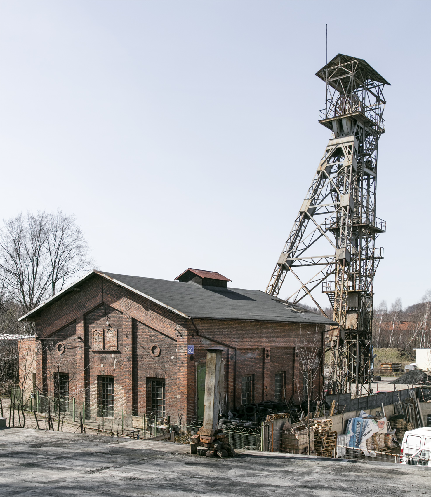 KWK Julia Schacht Chwalibóg 1